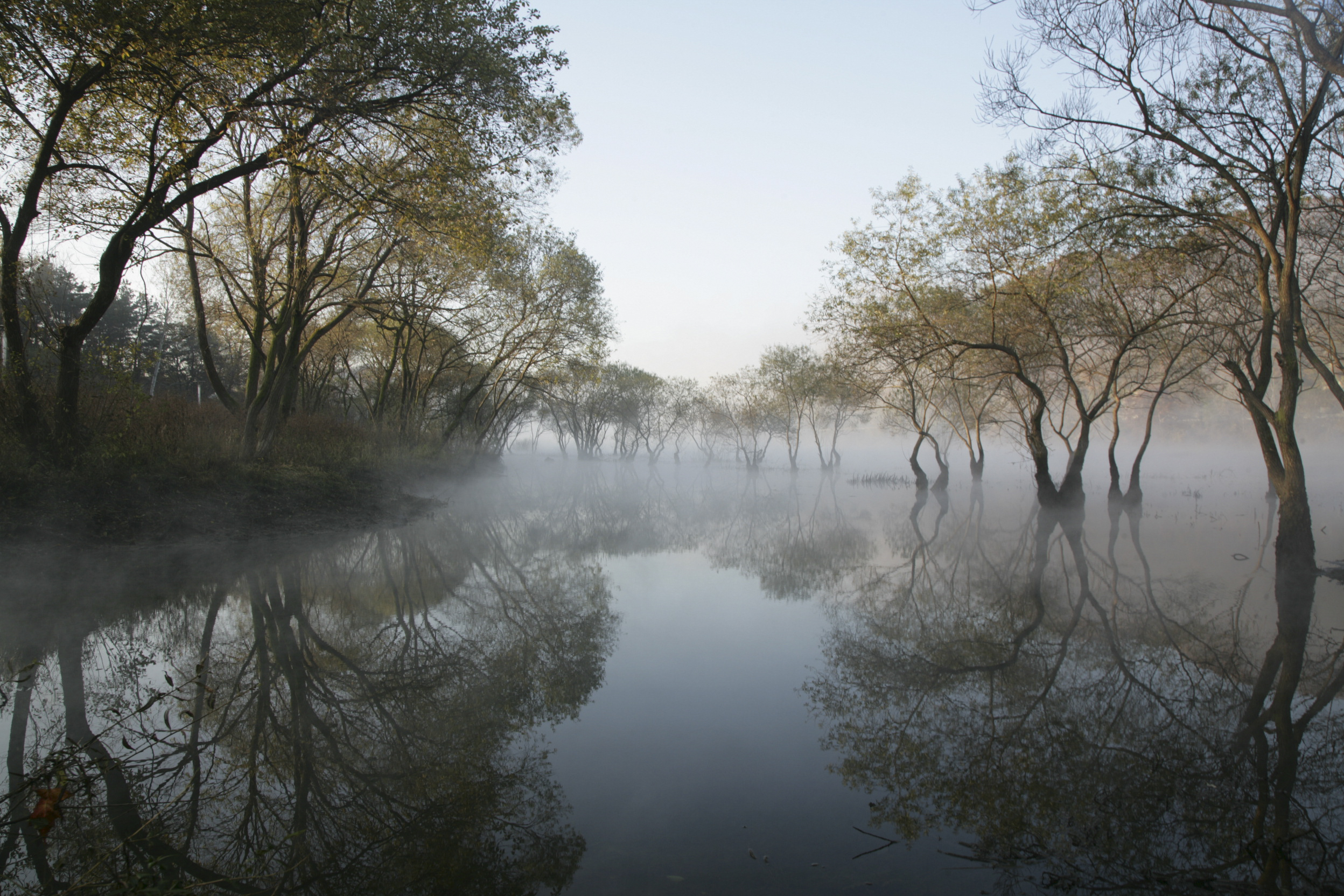 대청호오백리길 21구간_4